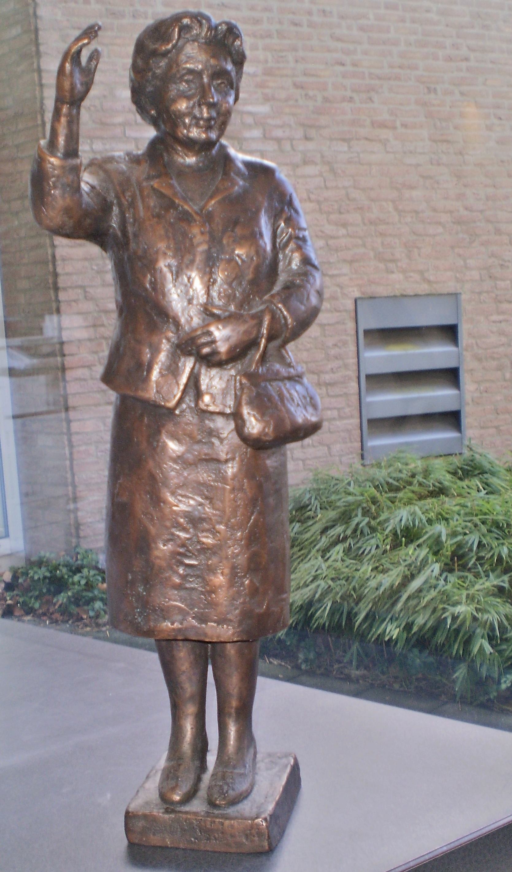 Nieneke Lamme heeft het bronzen beeld van 55 cm van Juliana in een herkenbare pose gemaakt: haar in de plooi, tasje over de linkerarm, zwaaiend met de rechterarm